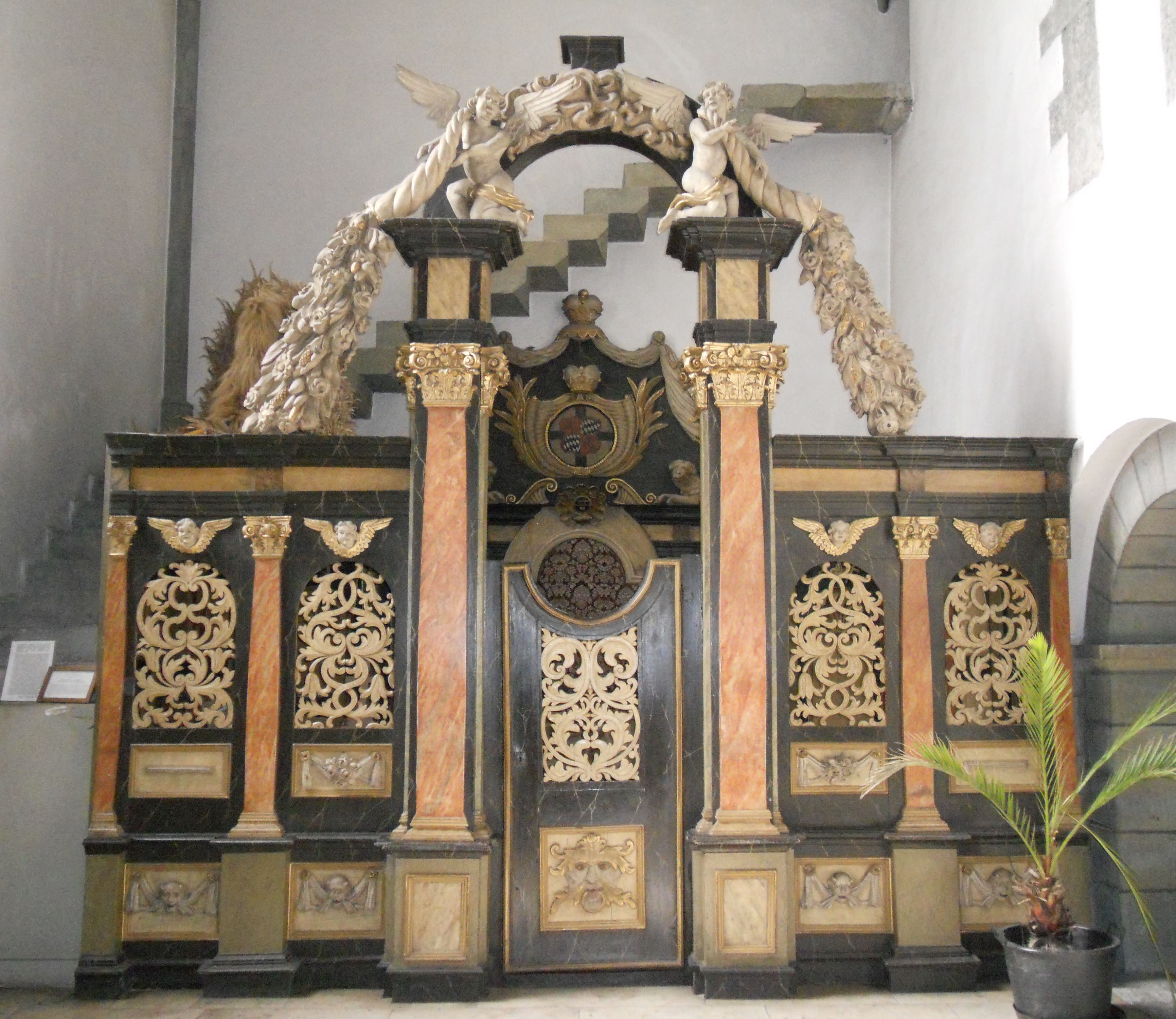 Offizialgericht in der Propsteikirche in Werl